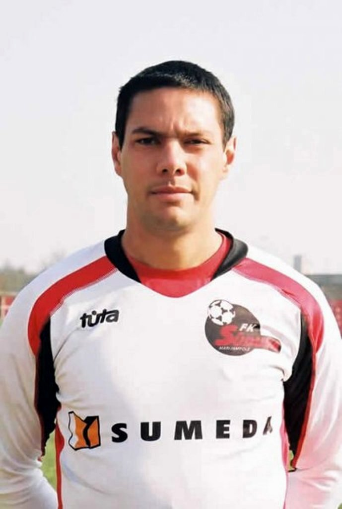 Otavio Braga